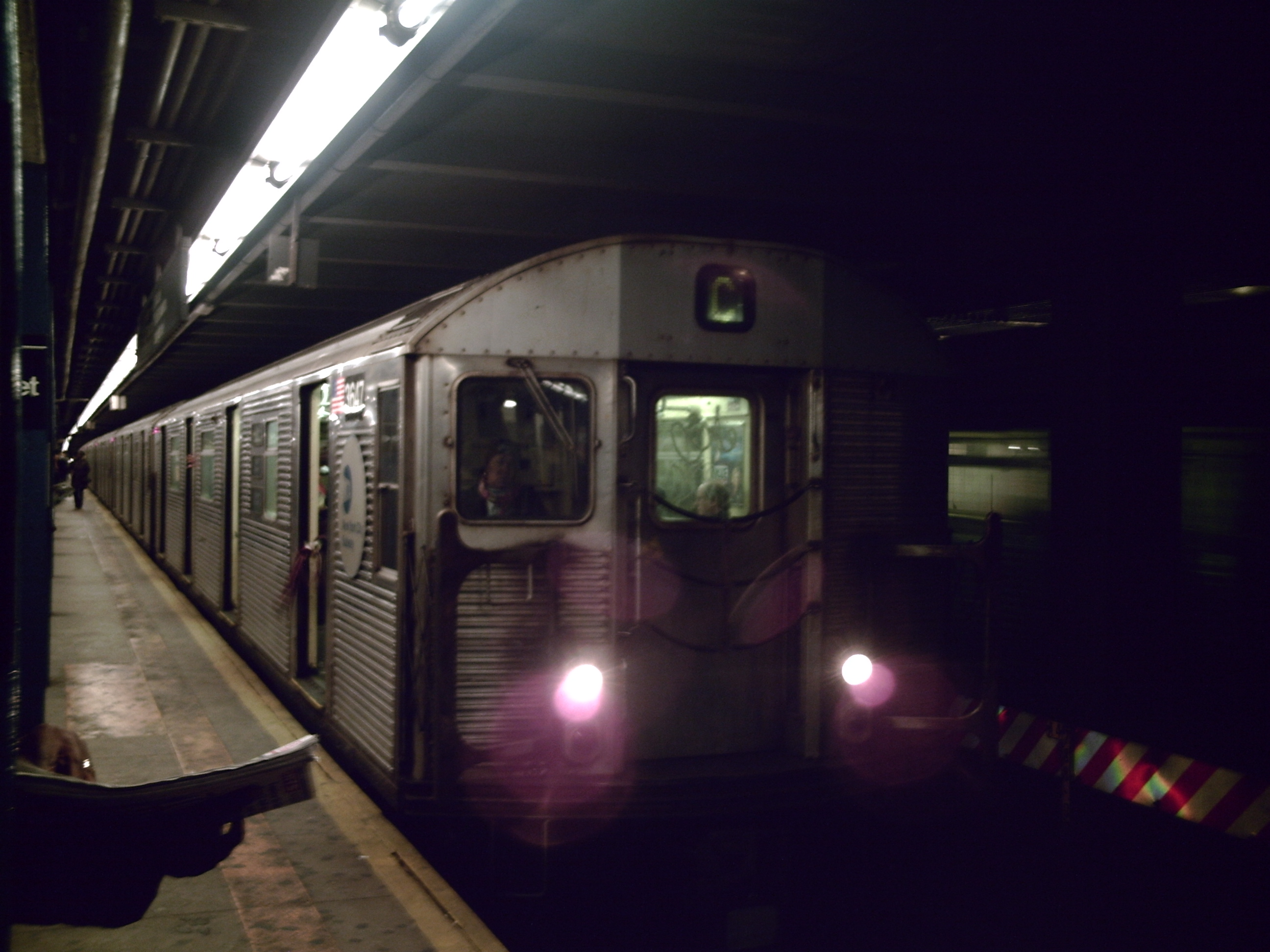 Tren del metro de Nueva York